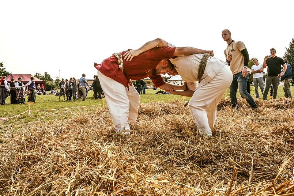 Suėmimas už diržo